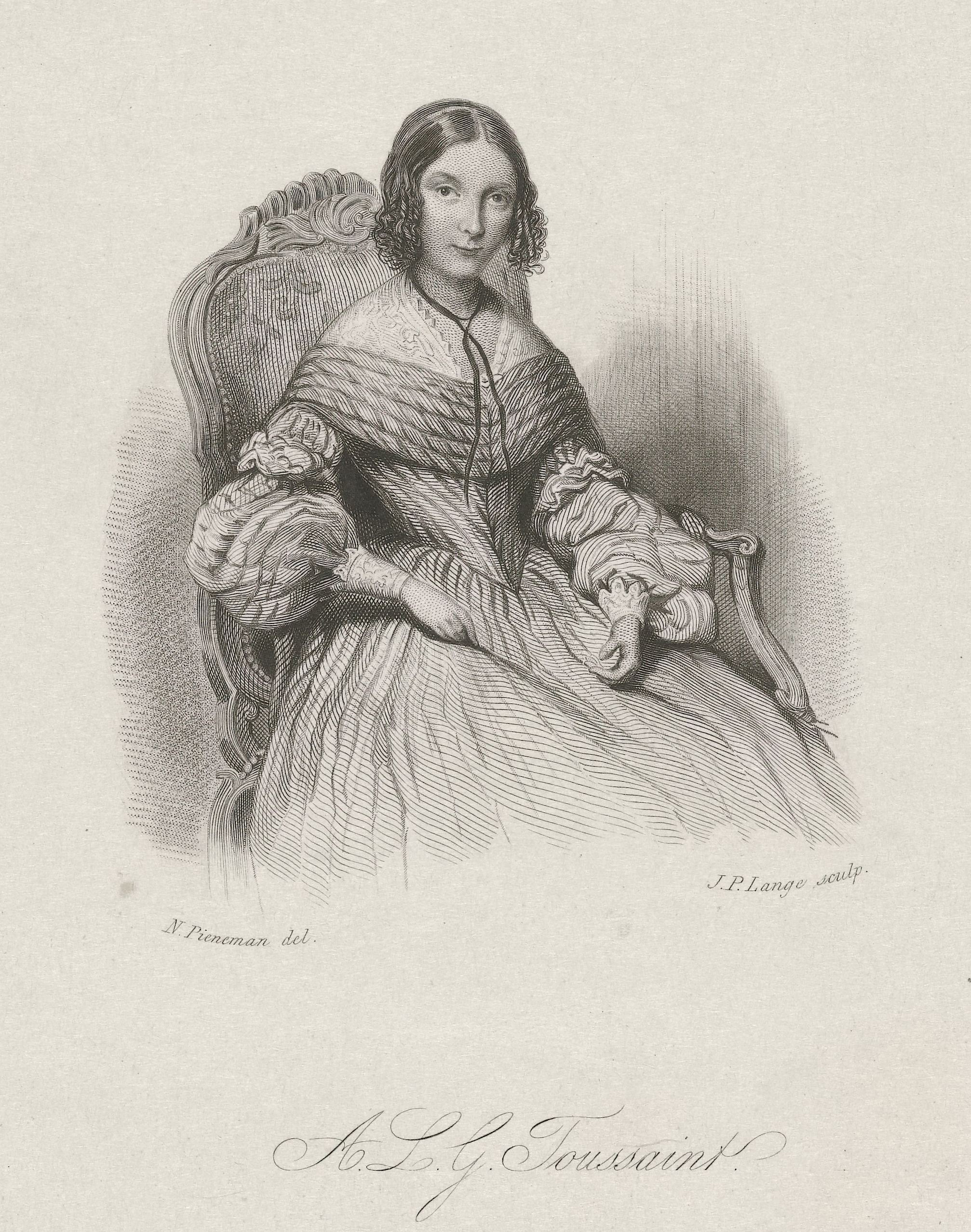 Portret Bosboom Anna Louisa Geertruida Bosboom-Toussaint door Johannes Philippus Lange naar tekening van Nicolaas Pieneman